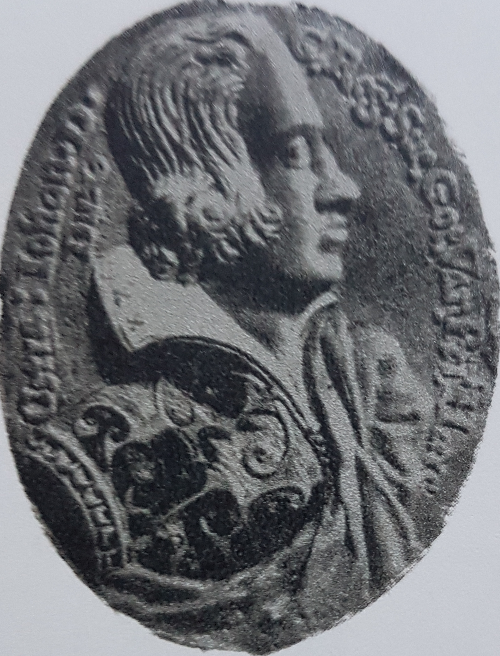 Hertig Johan medalj skapad av Ruprecht Miller 1610, avfotograferad bild från Allhems Svenskt konstnärslexikon